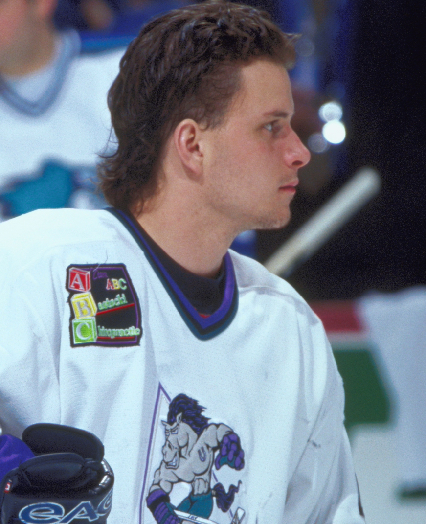 ahlstar0084